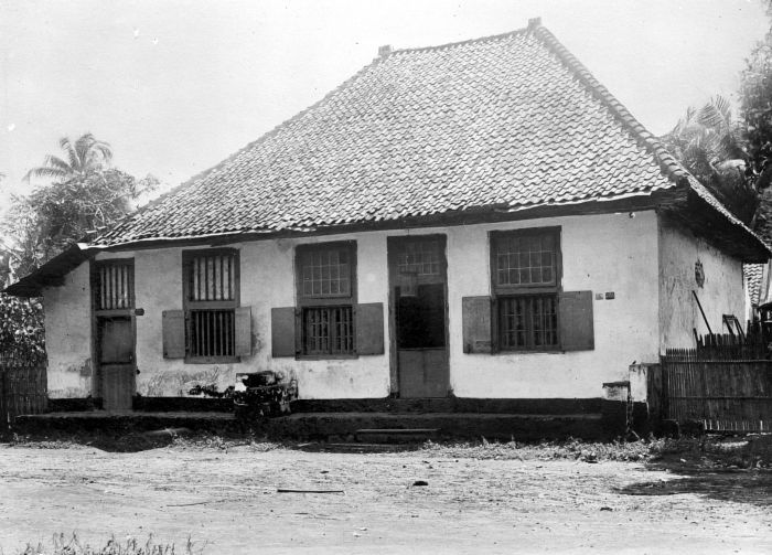 Repronegatief. Oud Hollandse huisje, Gang Missigit, Batavia